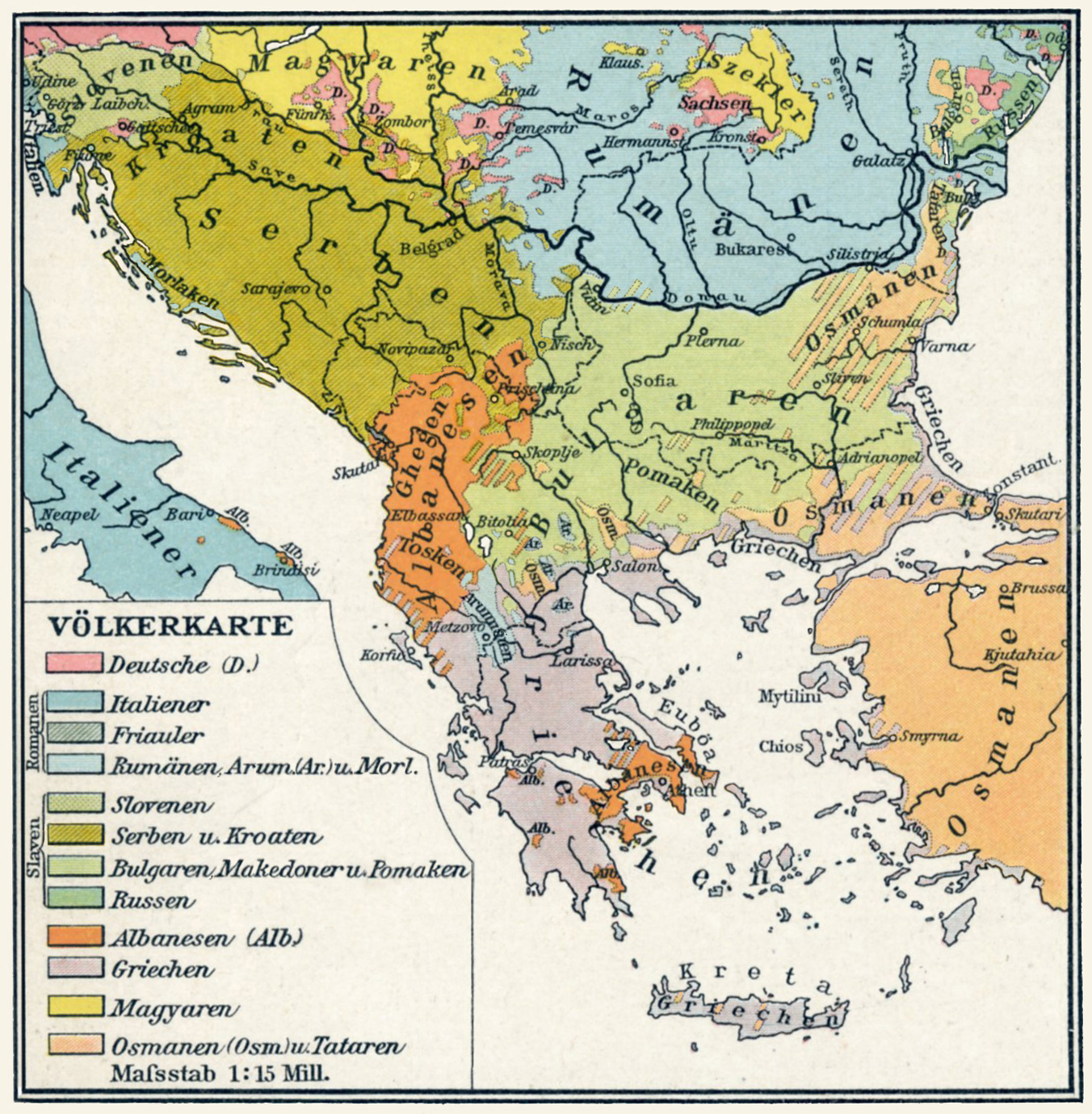 Carte des peuples des Balkans (en allemand)